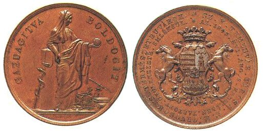 Johann Daniel Böhm (1794-1765) Bildhauer und Medailleur